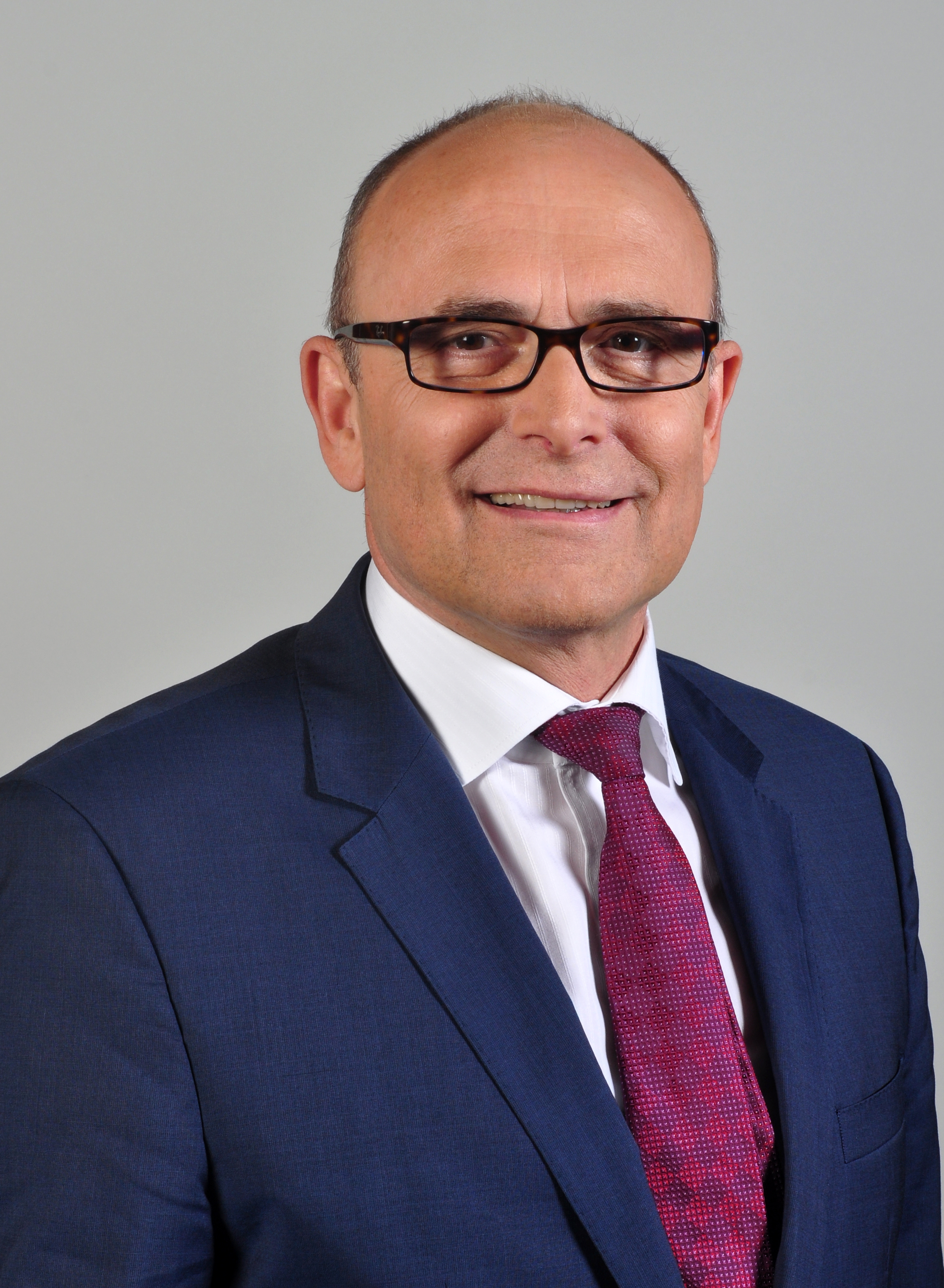 Erwin Sellering, SPD